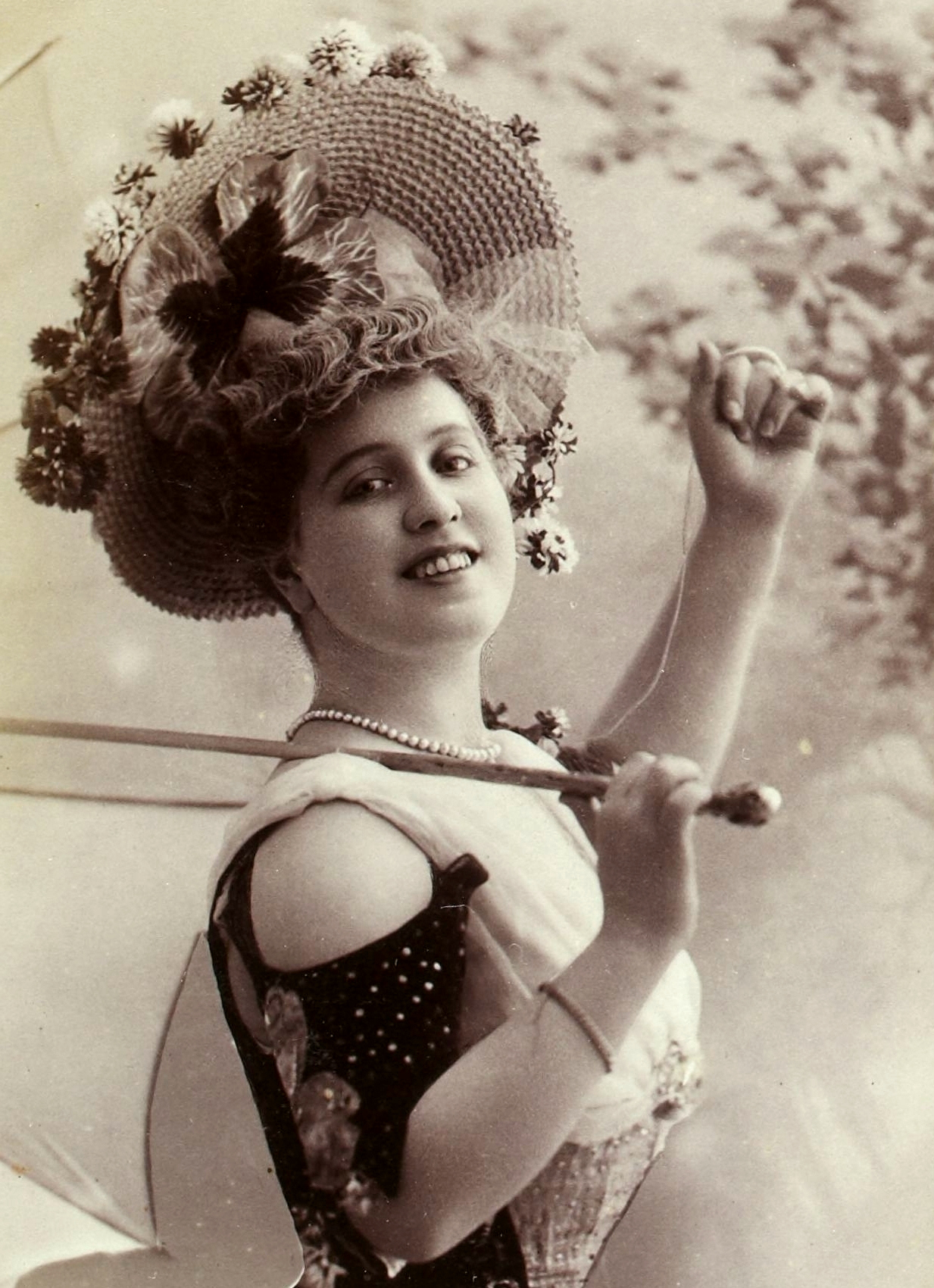 Album Reutlinger de portraits divers, vol. 28 : [photographie positive] : Marguerite Brésil.